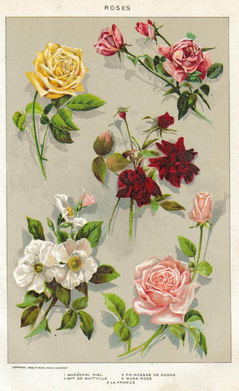 Painting